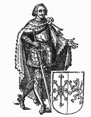 Diederik V